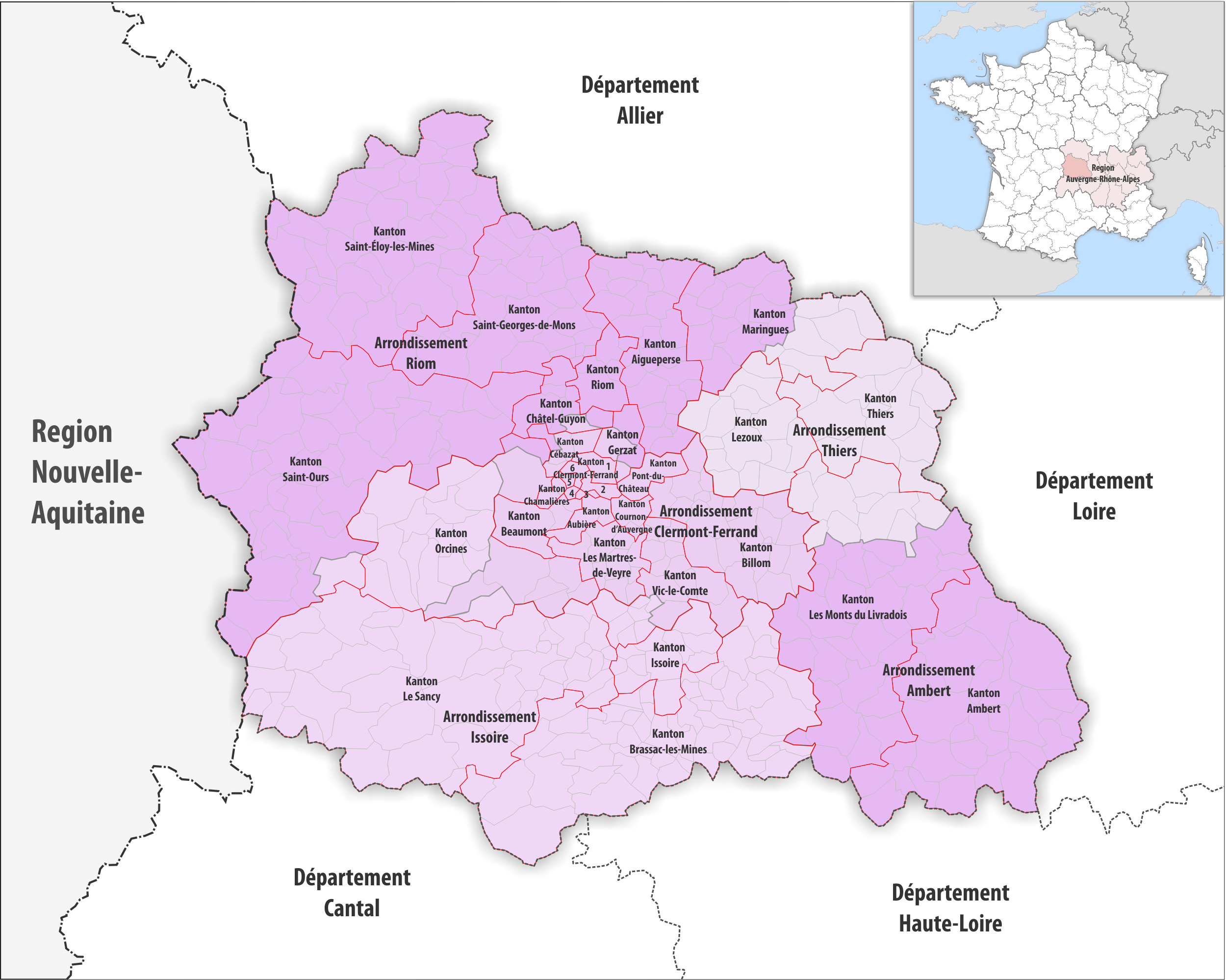 Gemeinden, Kantone und Arrondissemente im Departement Puy-de-Dôme